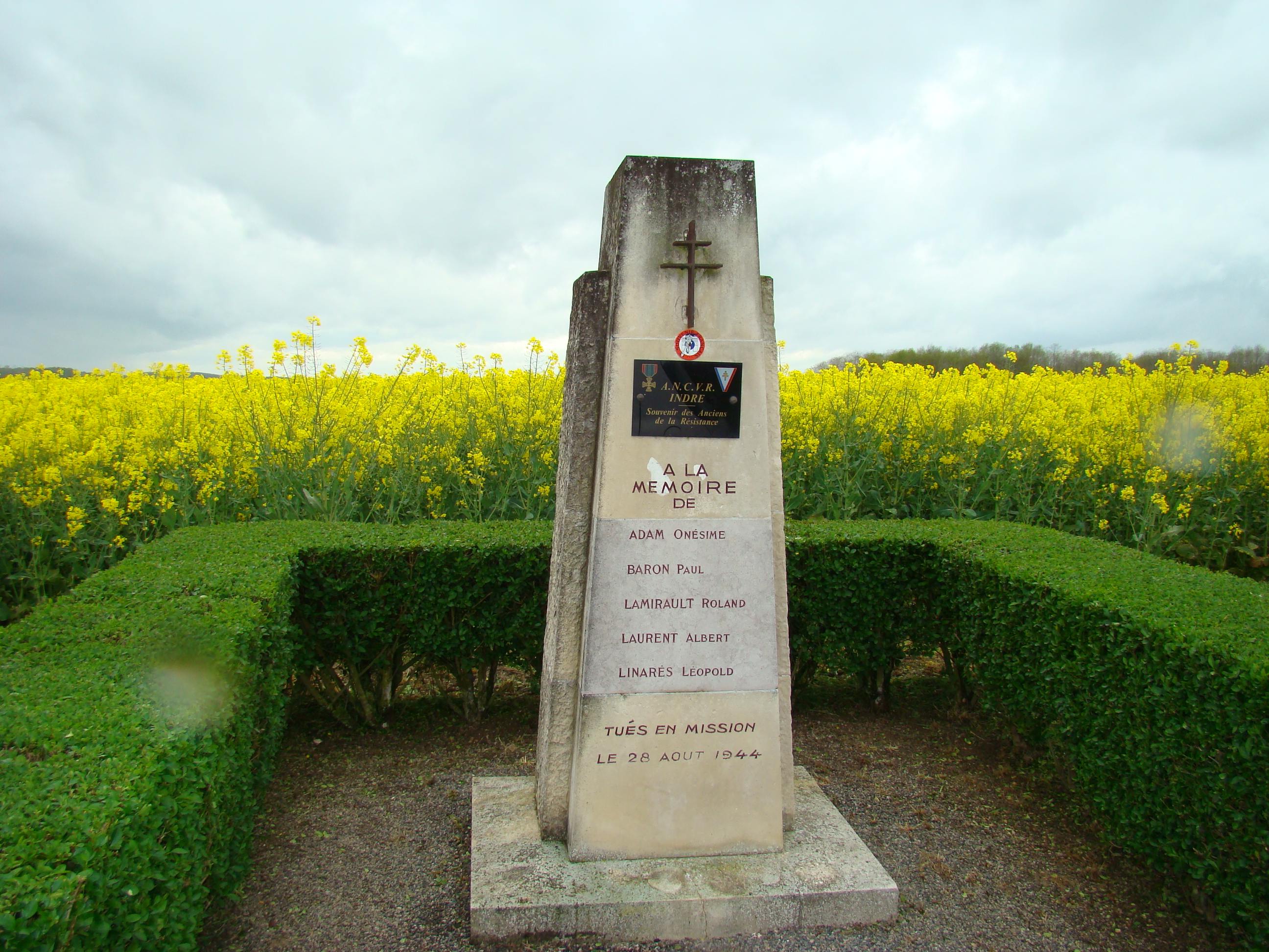 Stèle érigée à la mémoire des 5 hommes tués en mission le 28 août 1844 au lieu dit la Butte Monbelle sur la commune de Heugnes